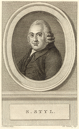 Portrait de Simon Stijl, homme politique et écrivain néerlandais